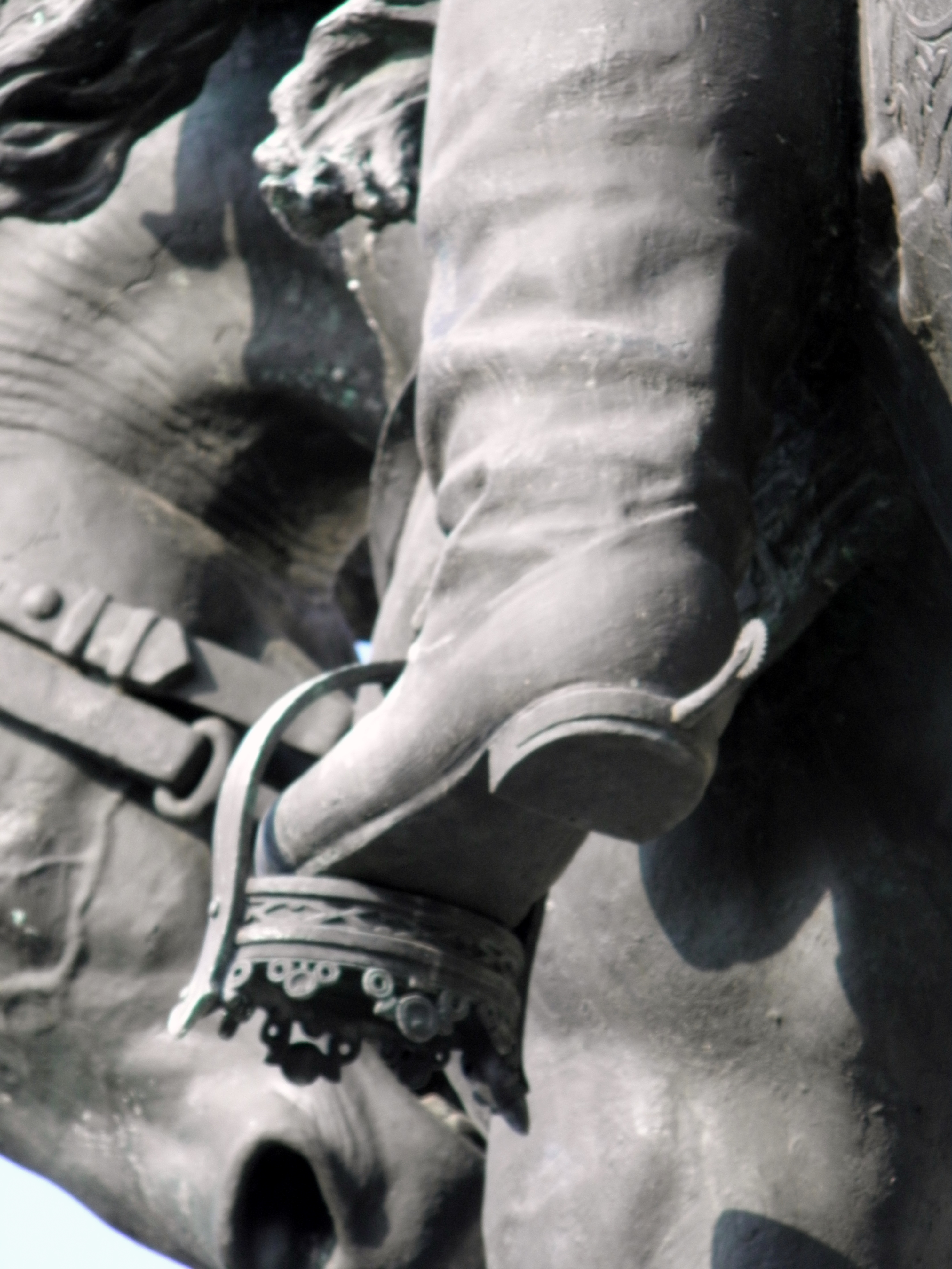 Rovigo, Piazza Giuseppe Garibaldi. Monumento equestre dedicato a Giuseppe Garibaldi: dettaglio dello stivale che poggia sulla staffa ad immagine della corona sabauda.